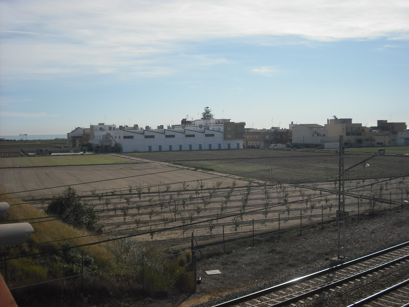 Vista de la pedanía de Cúiper (Foyos)